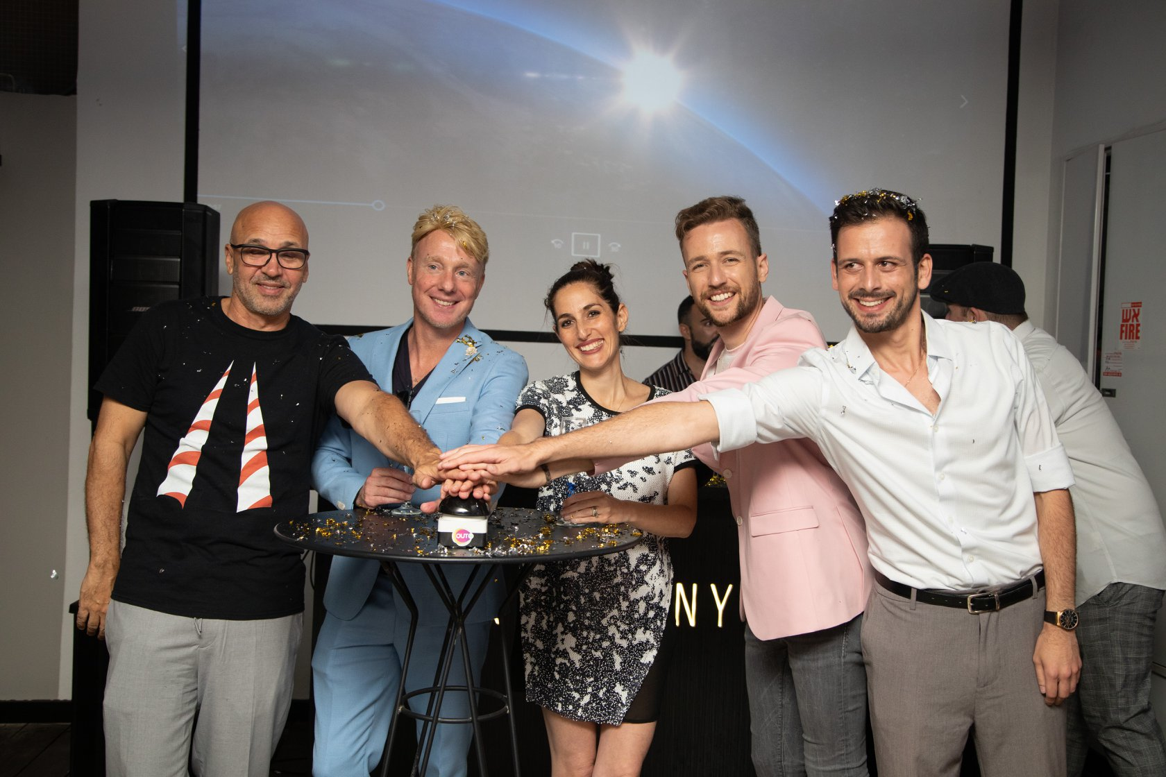 השקת הערוץ "PRIDEtv"